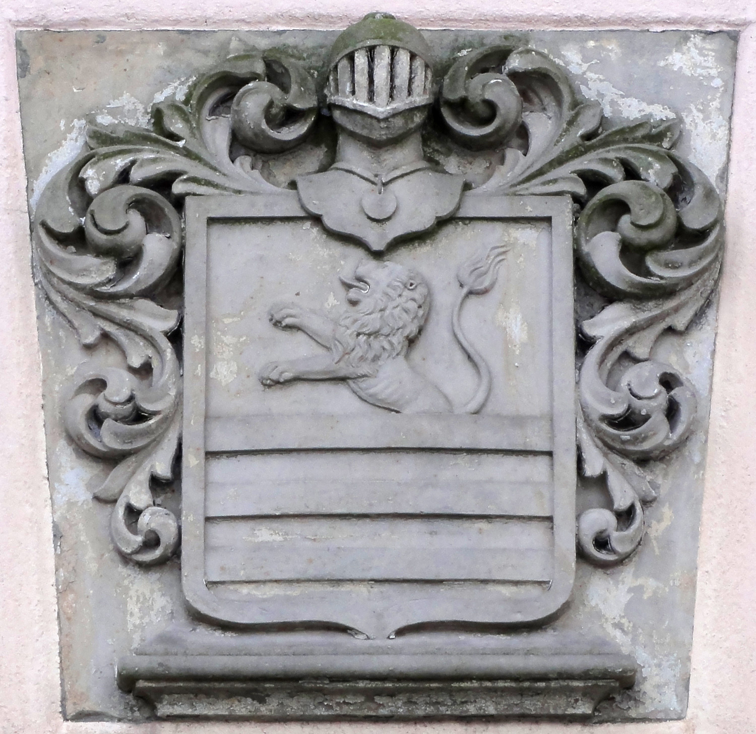 Egestorff-Stiftung in Bremen: Gutshaus (um 1755), Wappen von Büren über dem Westeingang Das abgebildete Objekt ist ein geschütztes Kulturdenkmal in der Freien Hansestadt Bremen, mit der Nr. 1724 beim Landesamt für Denkmalpflege registriert.